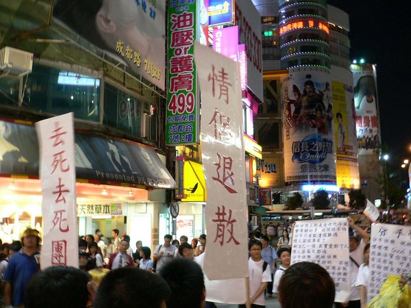 去死去死團在臺北市西門町發起的遊行活動。